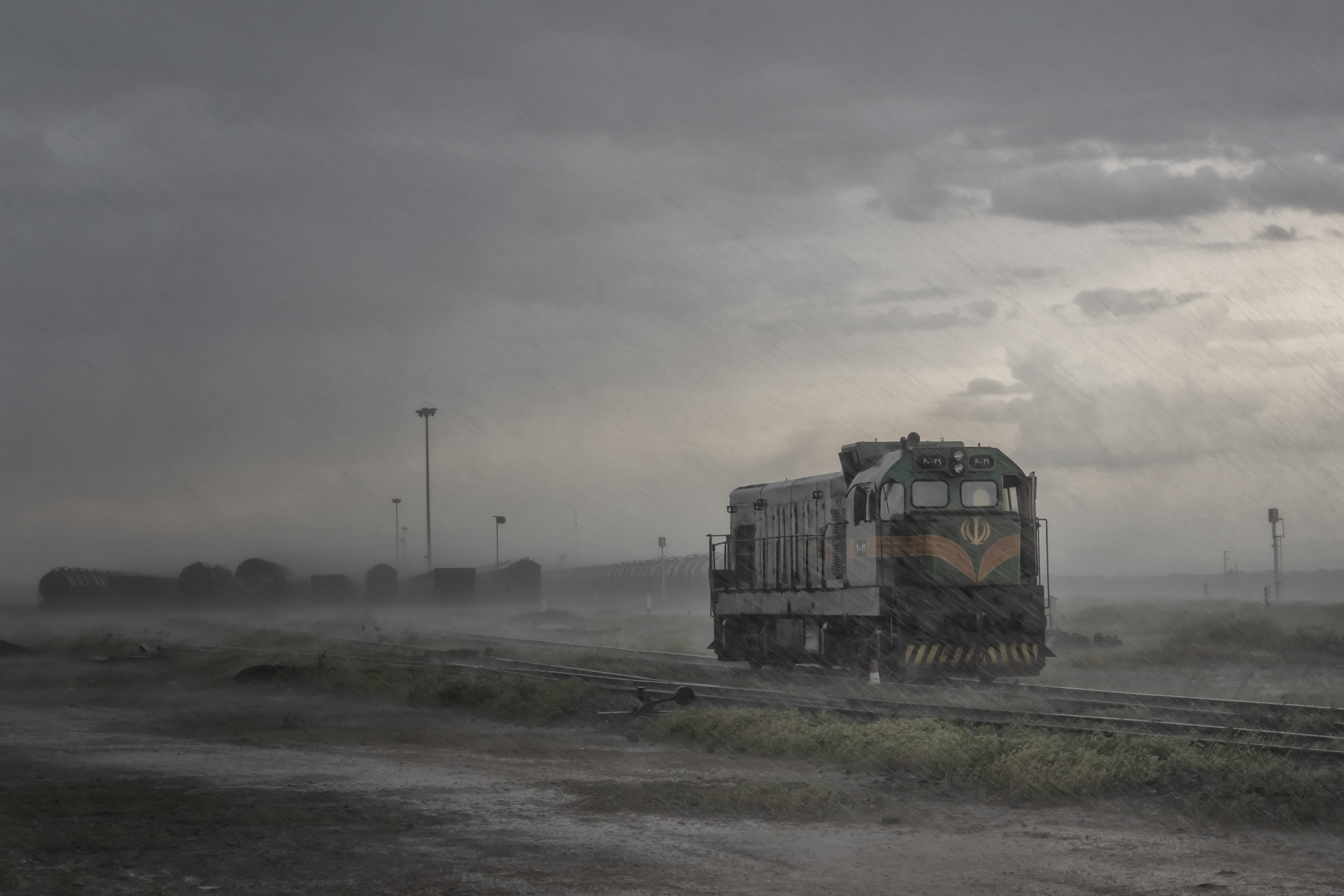 General Motors Diesel was a railway diesel locomotive manufacturer located in London, Ontario, Canada. It was created in 1949 as the Canadian subsidiary of the Electro Motive Division of General Motors (EMD) located in the United States.